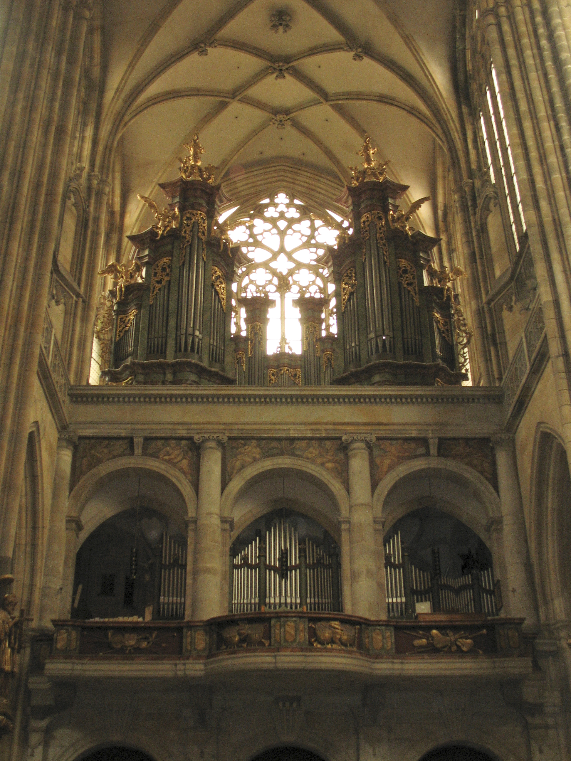 Praha, Katedrála svatého Víta, Václava a Vojtěcha, hudební kruchta